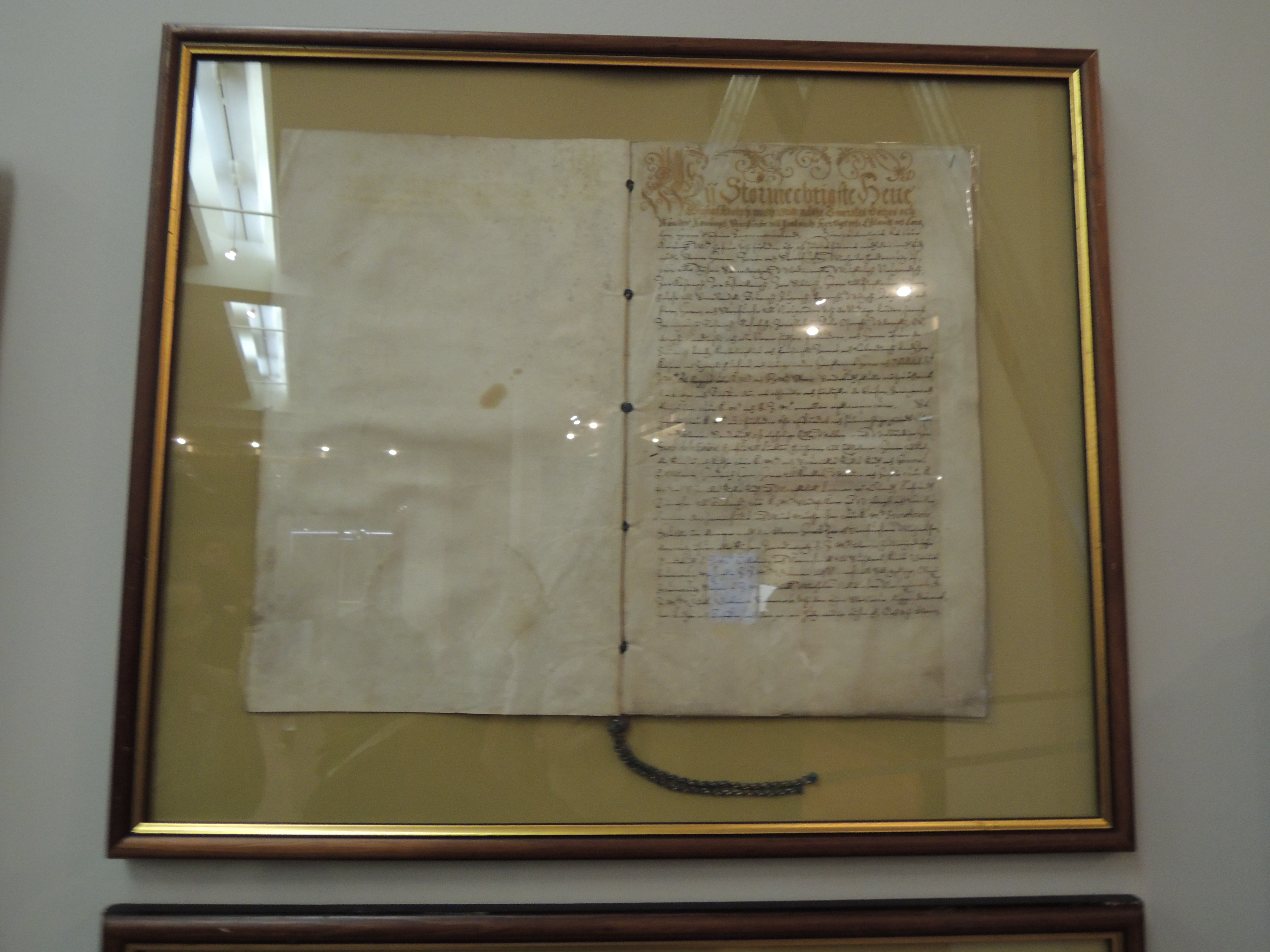 1 мая 1617 года. Ратификация шведского короля Густава Адольфа на Столбовский договор о вечном мире между Россией и Швецией. Пергамен. Шведский язык, титул короля выполнен золотой краской, прошита шелковым шнуром. Подпись-автограф короля. РГАДА. Ф. 96. Оп. 3, Д. 26, Л. 1 Выставка "Романовы. Начало династии", приуроченная к 400-летию избрания на царство Михаила Федоровича Государственный Исторический музей, весна 2013 года